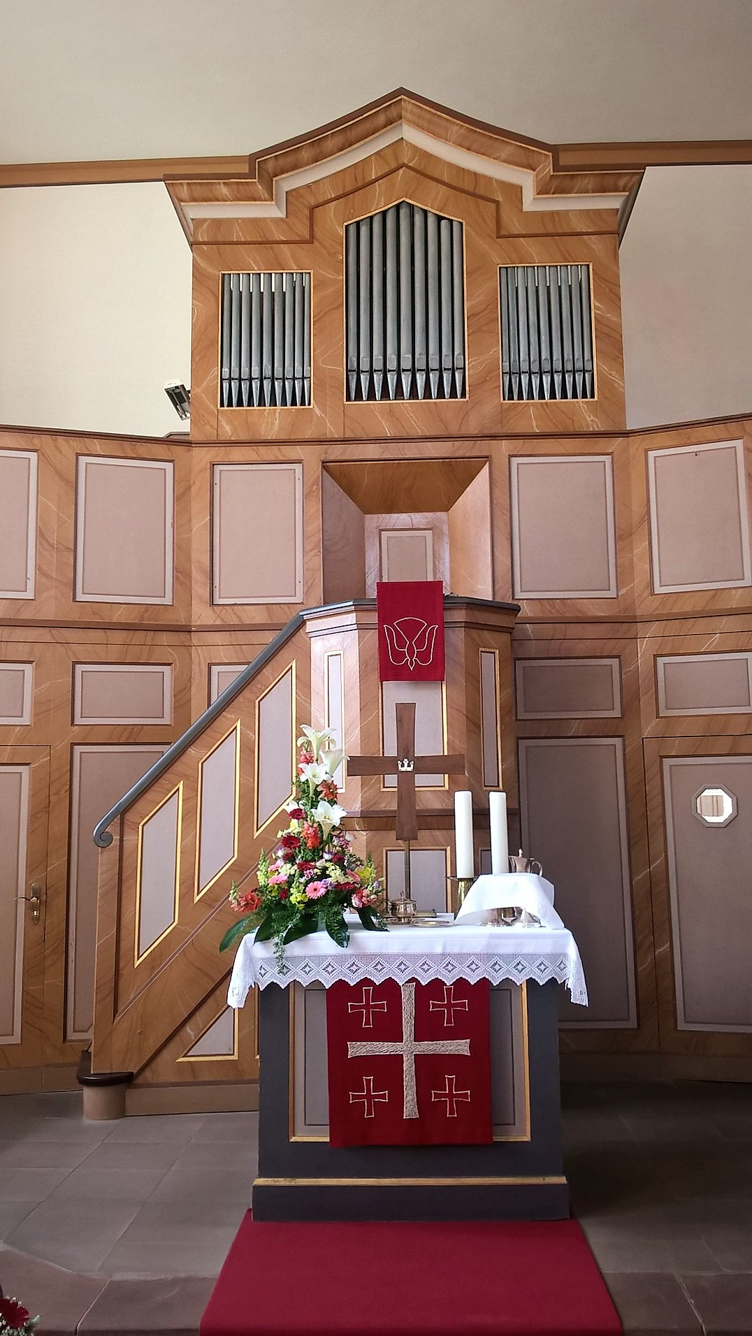 Evangelische Kirche Lumda, Grünberg, Landkreis Gießen, Hessen, Deutschland